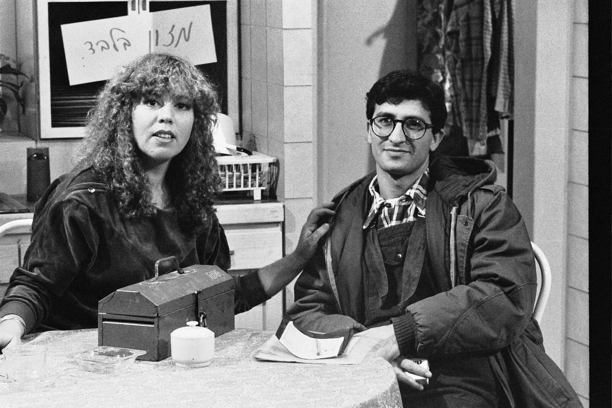 צוות תוכנית הטלוויזיה קרובים קרובים של הטלוויזיה הלימודית : תיקי דיין עם מאיר סוויסה